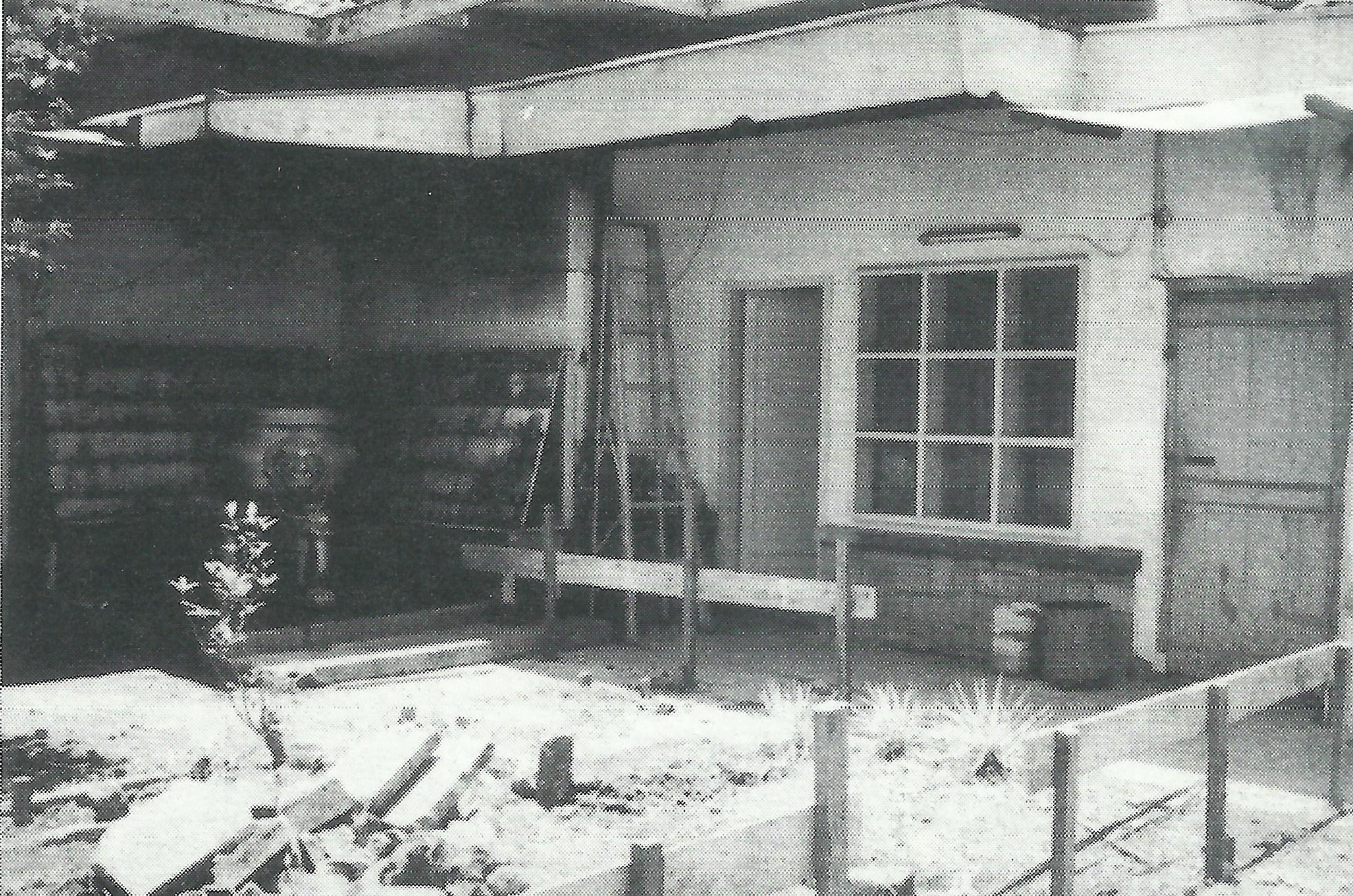 Kuti Bhante Ashin tempo doeloe